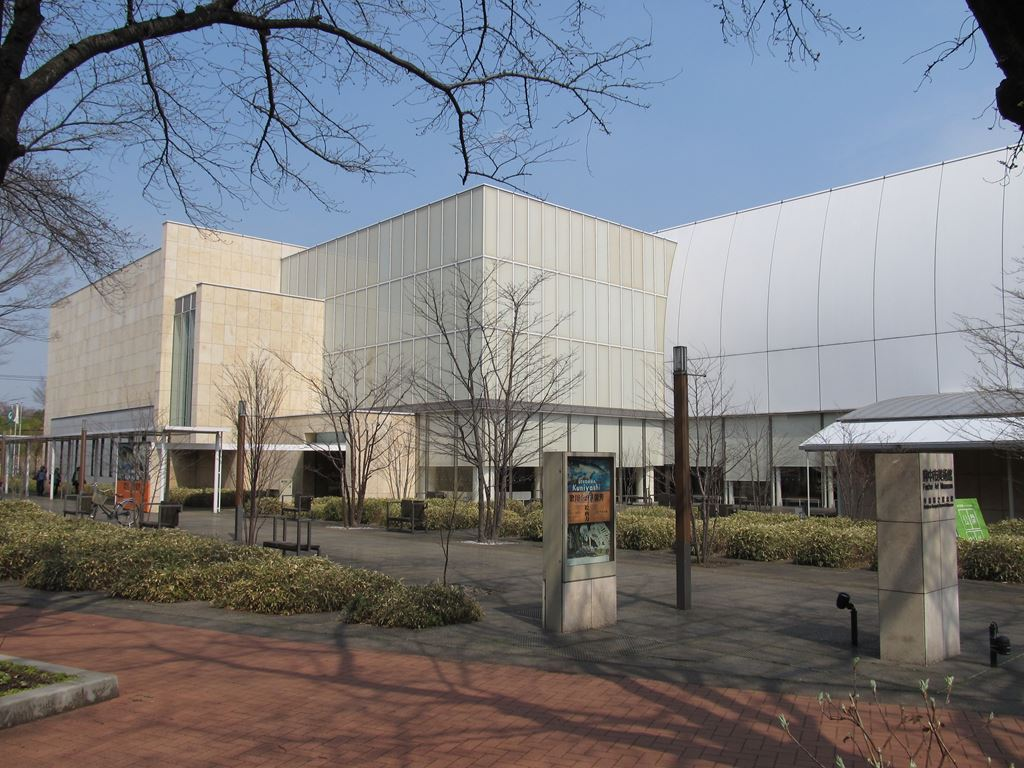 府中の森公園府中市美術館